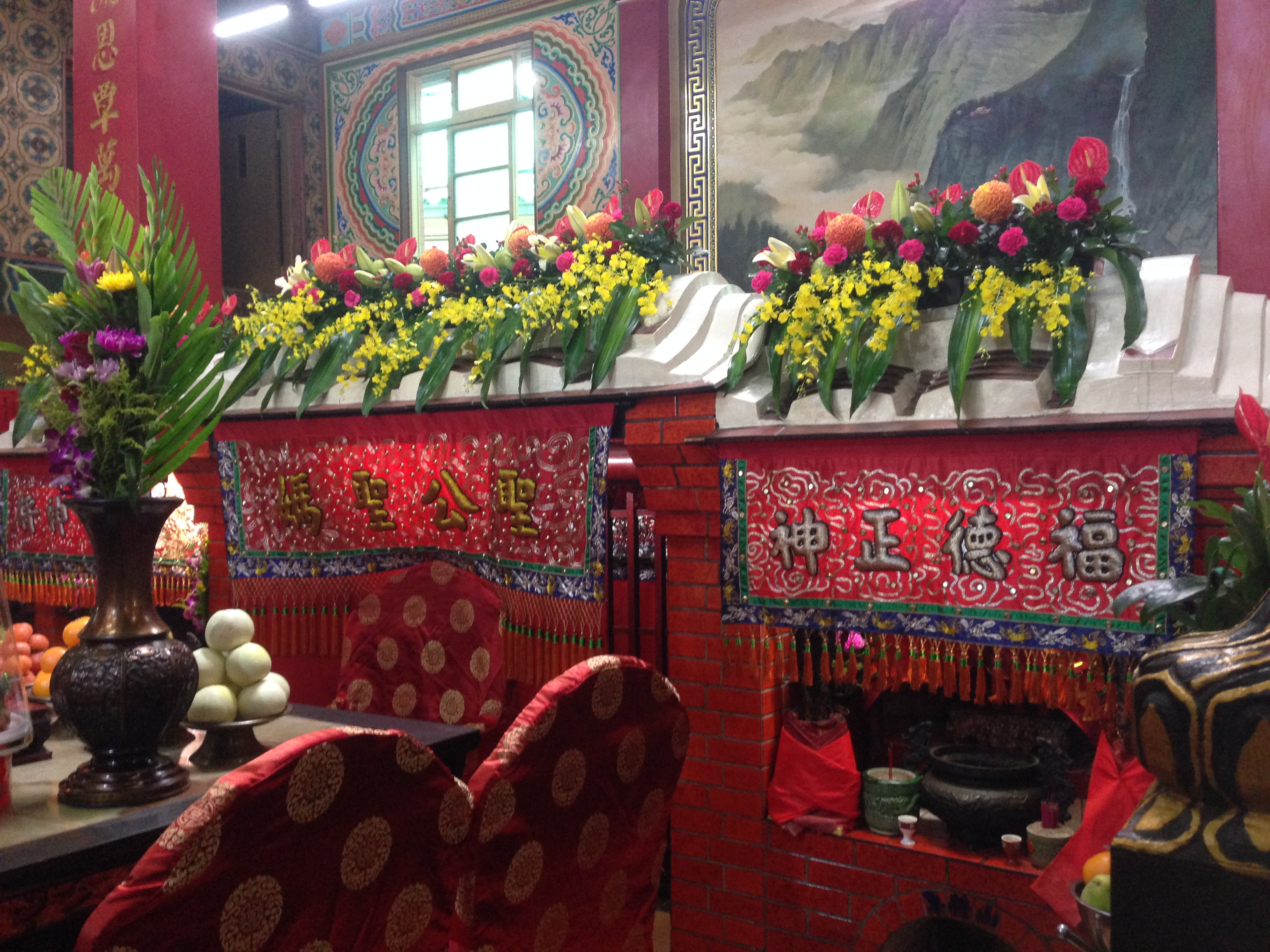 聖公媽廟內小廟